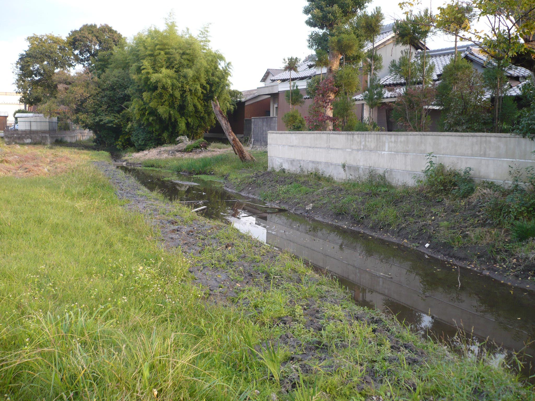 堀跡